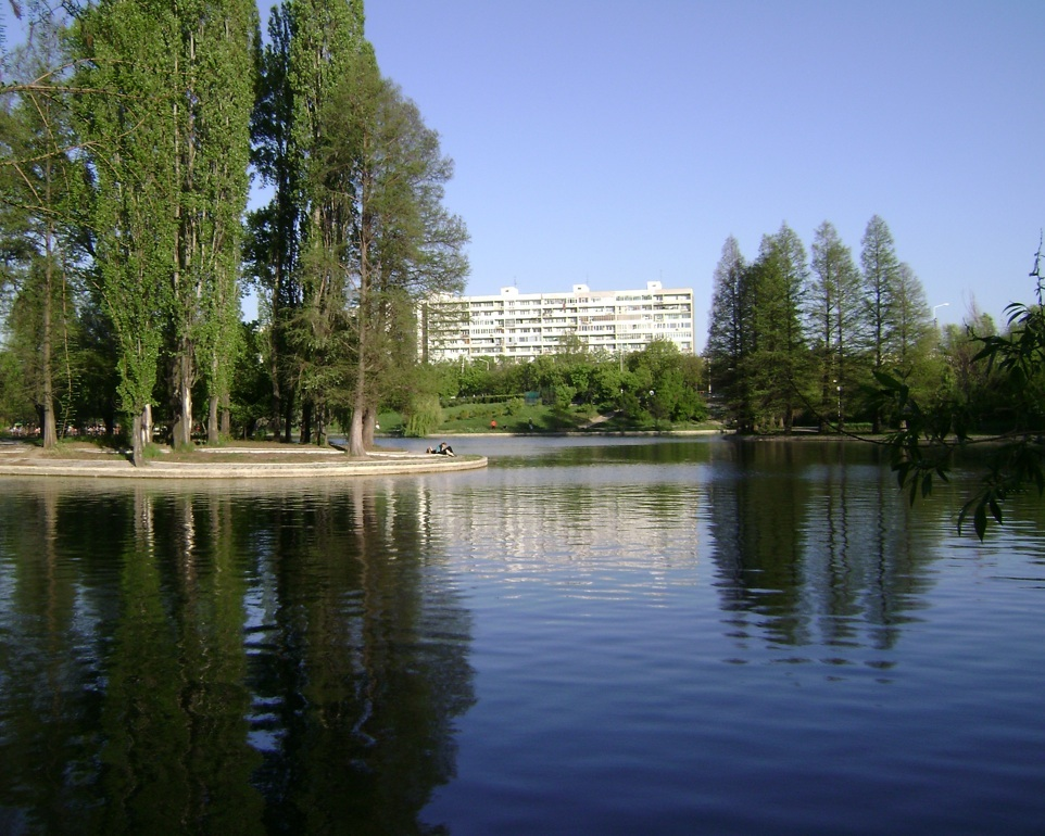 Lacul IOR primăvara.